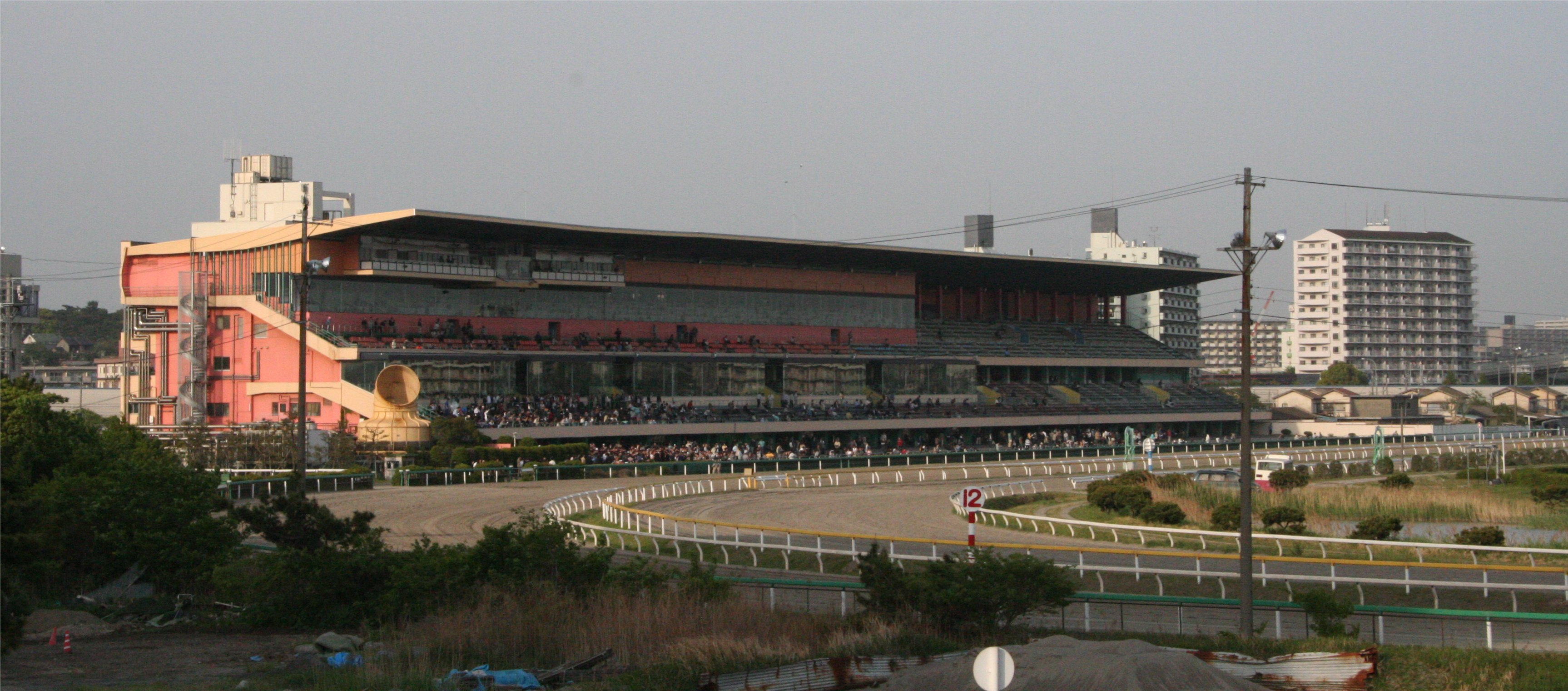 船橋競馬場 スタンド遠景 撮影日：2006年5月5日 撮影者：Goki